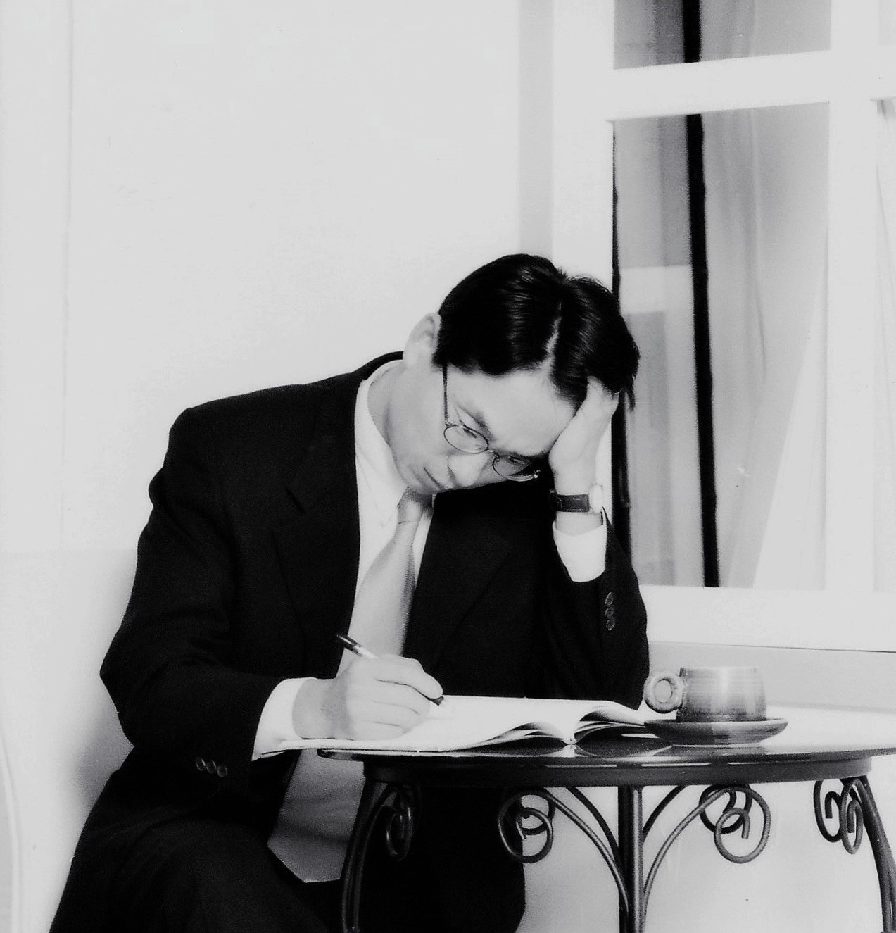 Ha Seungmoo Poet in his 30s at any cafe in Seoul